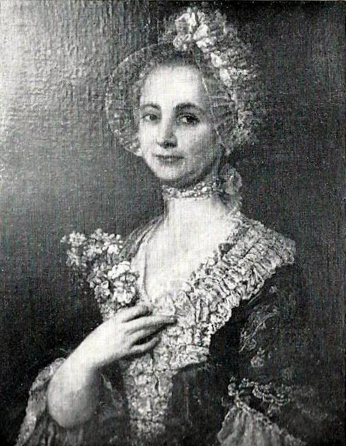 Porträt Franziska Louise Eleonore Benda, geborene Stephanie (1718-1758), erste Ehefrau des Violinisten und Komponisten Franz Benda.